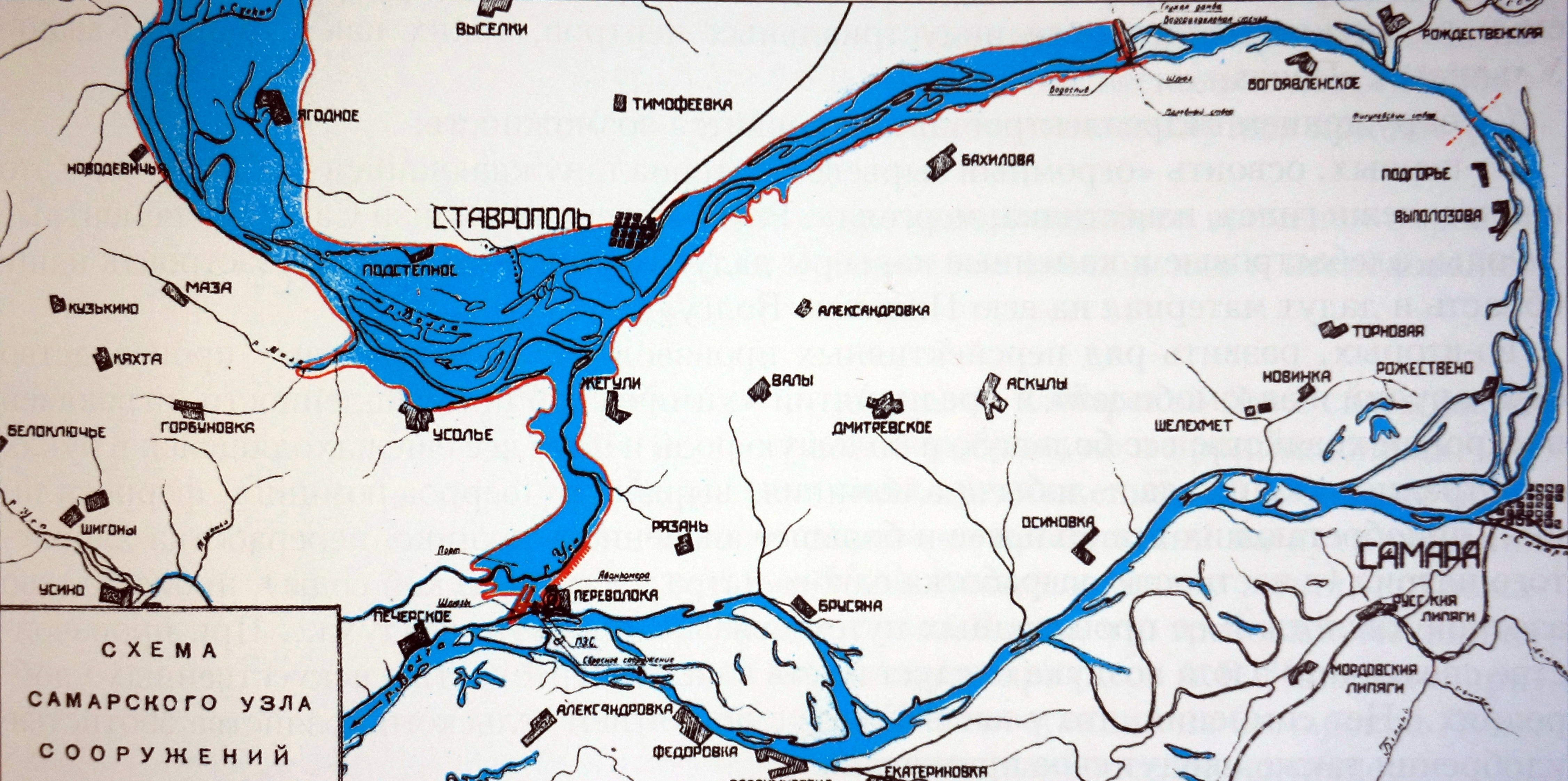 Одна их схем Самарского узла гидросооружений